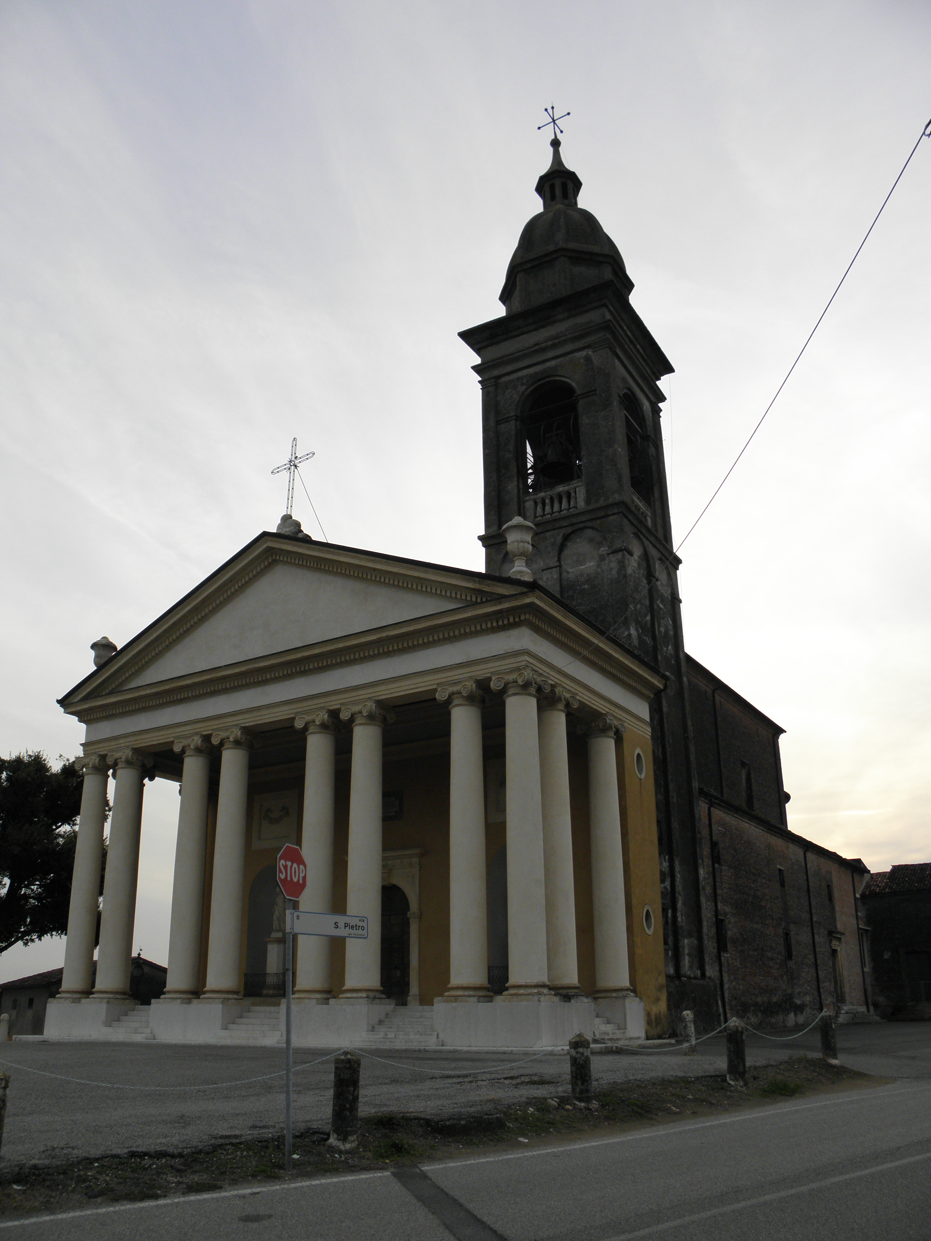 Isola Rizza, chiesa dei Santi Pietro e Paolo Apostoli.